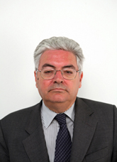 Storico, politico e accademico italiano